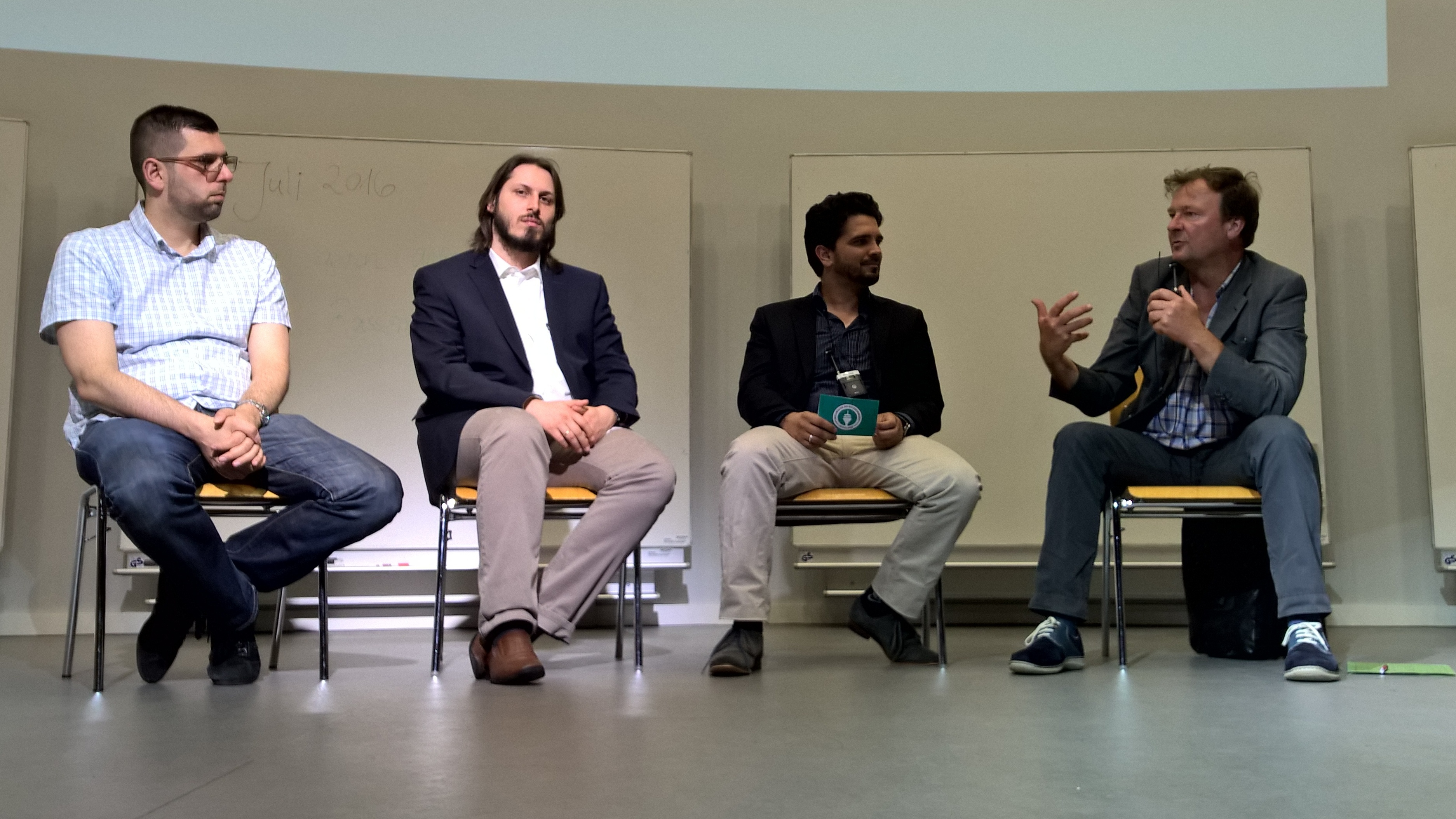 Alexander Häusler (Sozialwissenschaftler, rechts) auf einer Podiumsdiskussion der Muslimischen Hochschulgemeinde Düsseldorf an der Heinrich-Heine Universität Düsseldorf mit Ali Bas, MdL (B´90/Die Grünen), Kaan Orhon (Asien- und Islamwissenschaftler) und Eren Güvercin (Journalist und Autor) (von links nach rechts).